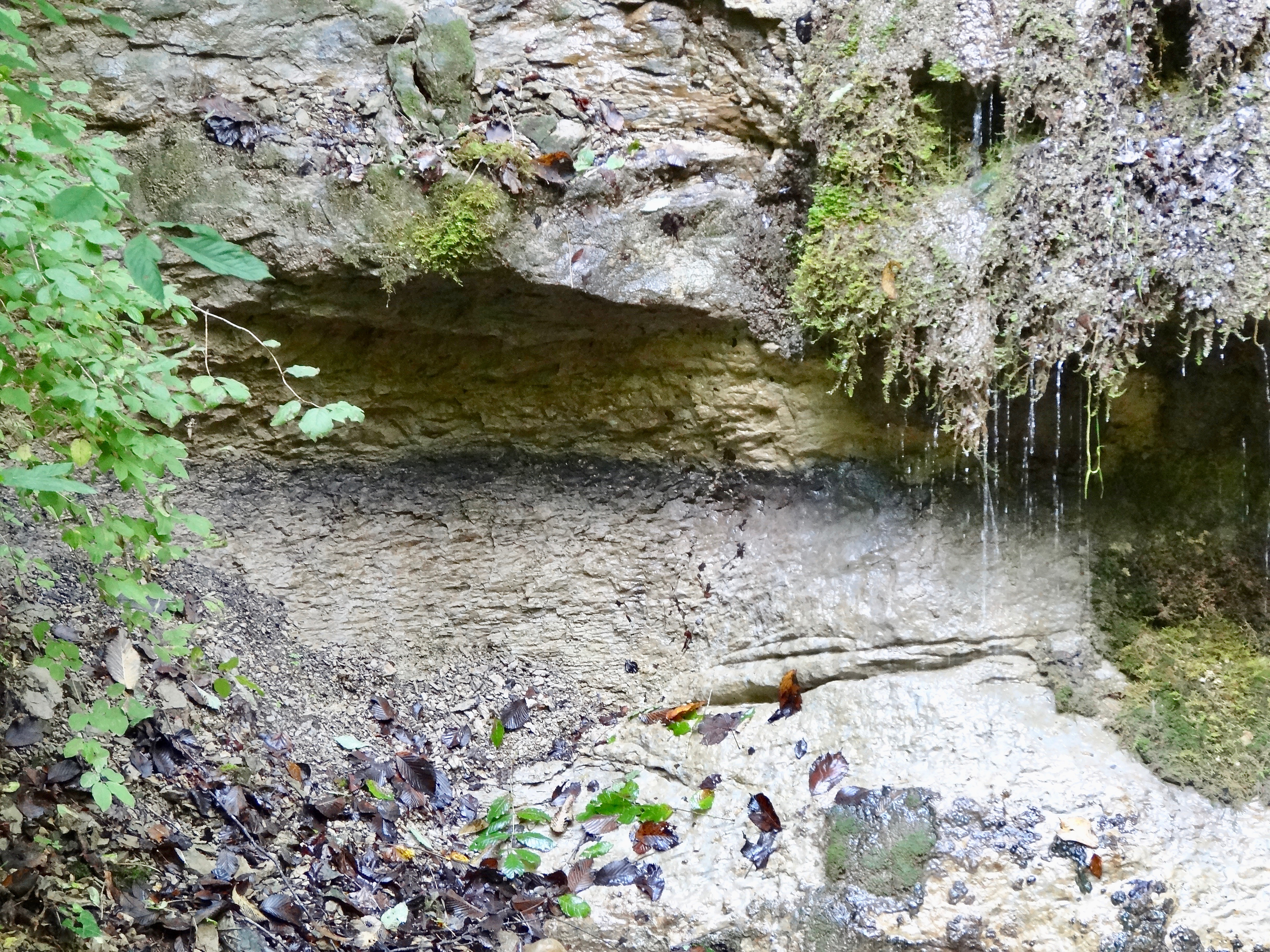 Der im Küsnachter Tobel aufgeschlossene, als kohlefarbener "Streifen" erkennbare Schwarzhorizont entstand, als ein Inkohlungsprozess während mehrerer Jahrmillionen die bei einem Hochwasser zerstörte Urwald-Vegetation zu Kohle presste.